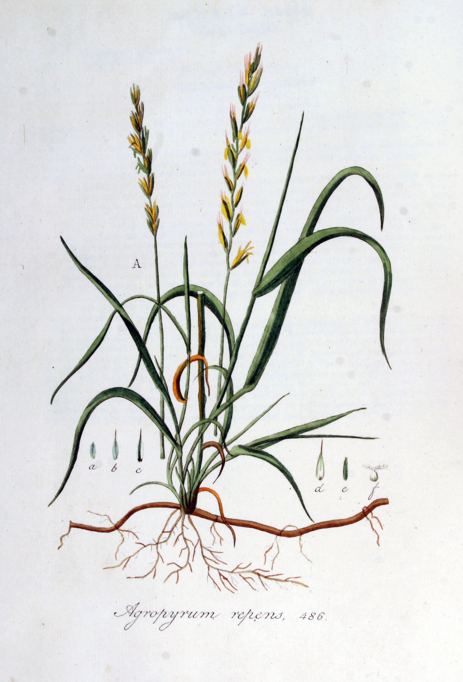 Elymus repens (L.) Gould (Syn. Agropyron repens (L.) P. Beauv.